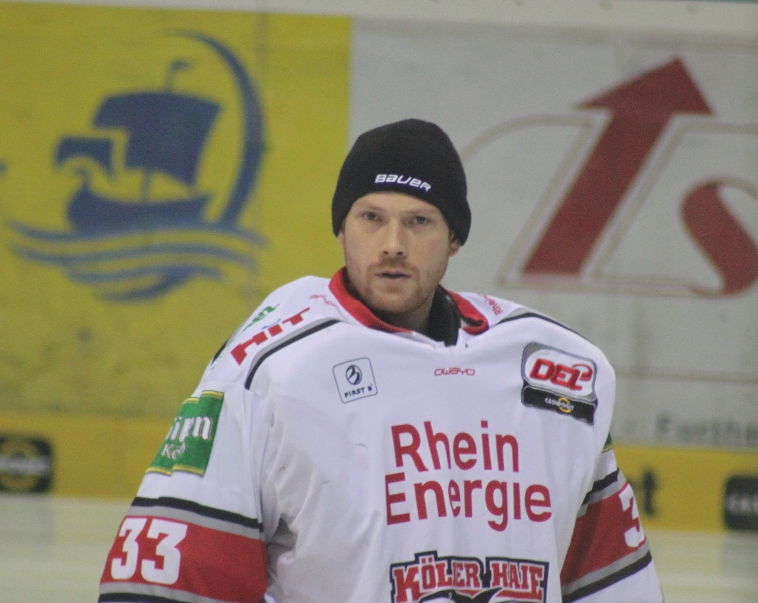 Danny Aus Den Birken im Trikot der Kölner Haie